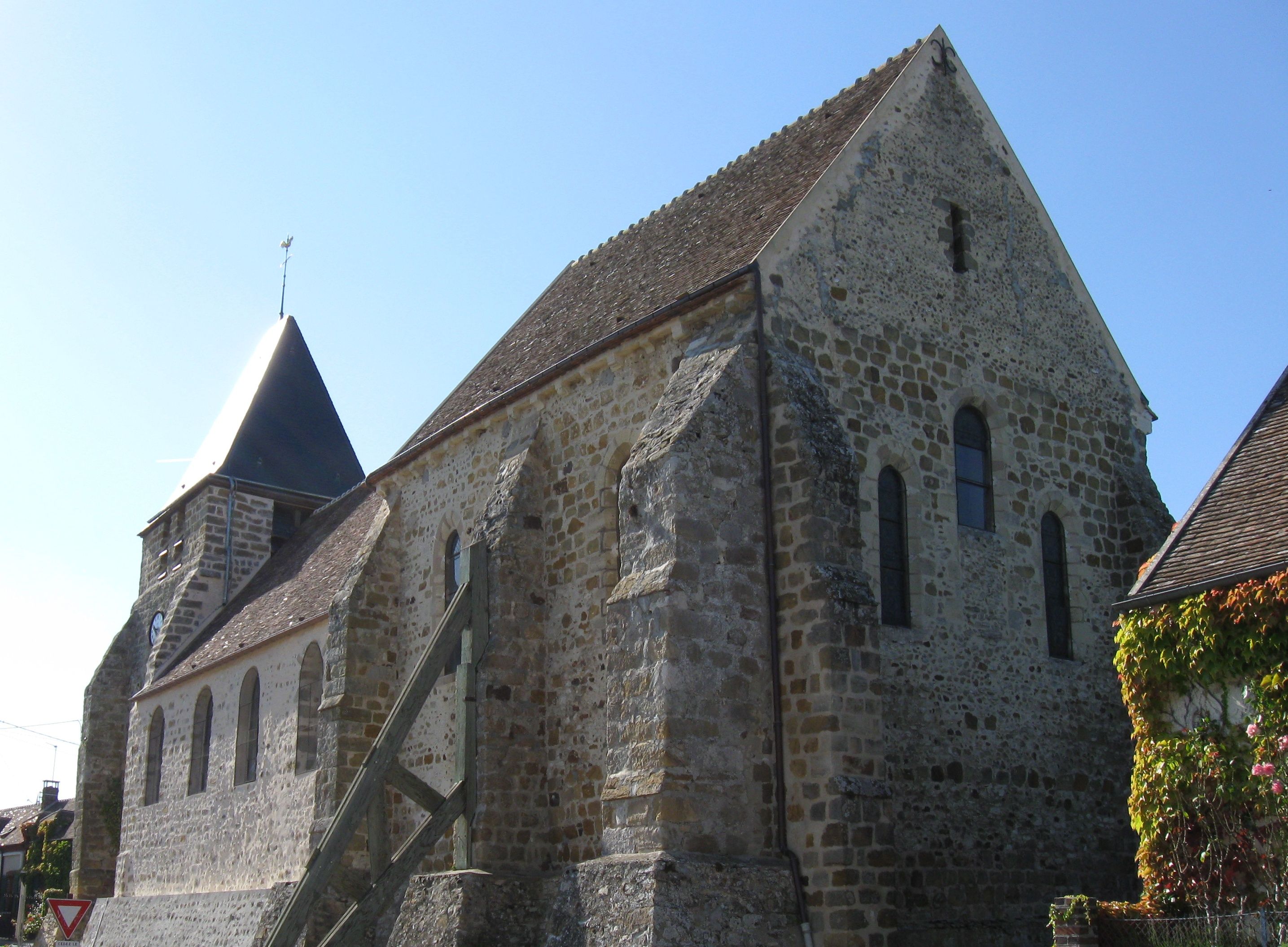 Église Saint-Martin et Saint-Féliciende d'Égligny. (Seine-et-Marne, région Île-de-France). .